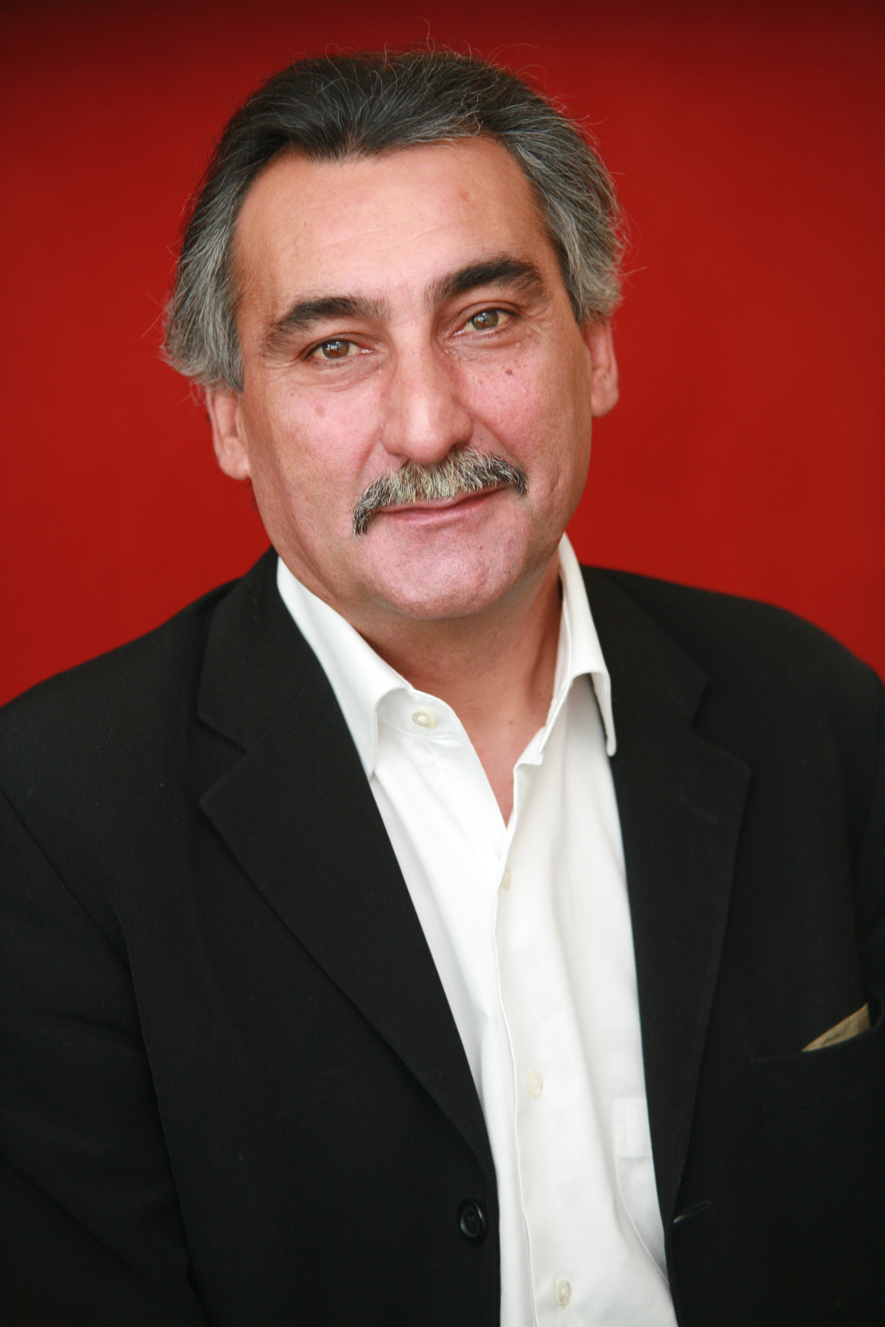 Guy Bono, homme politique français, membre du PS.